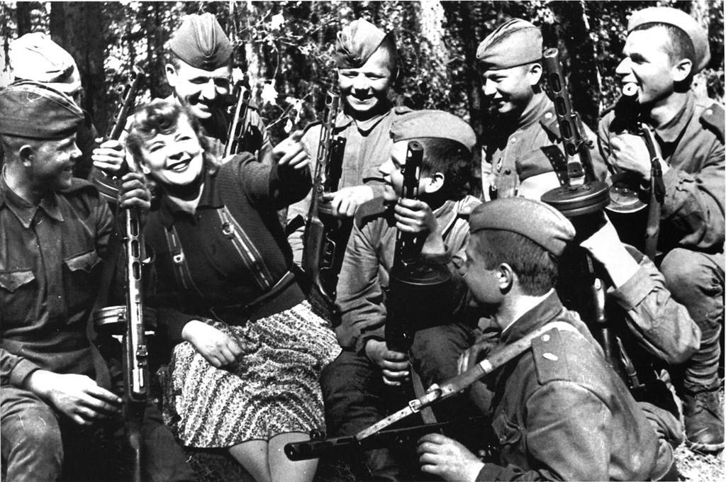 Зоя Федорова в перерыве концерта с бойцами одной из танковых частей Красной Армии, 1943 год